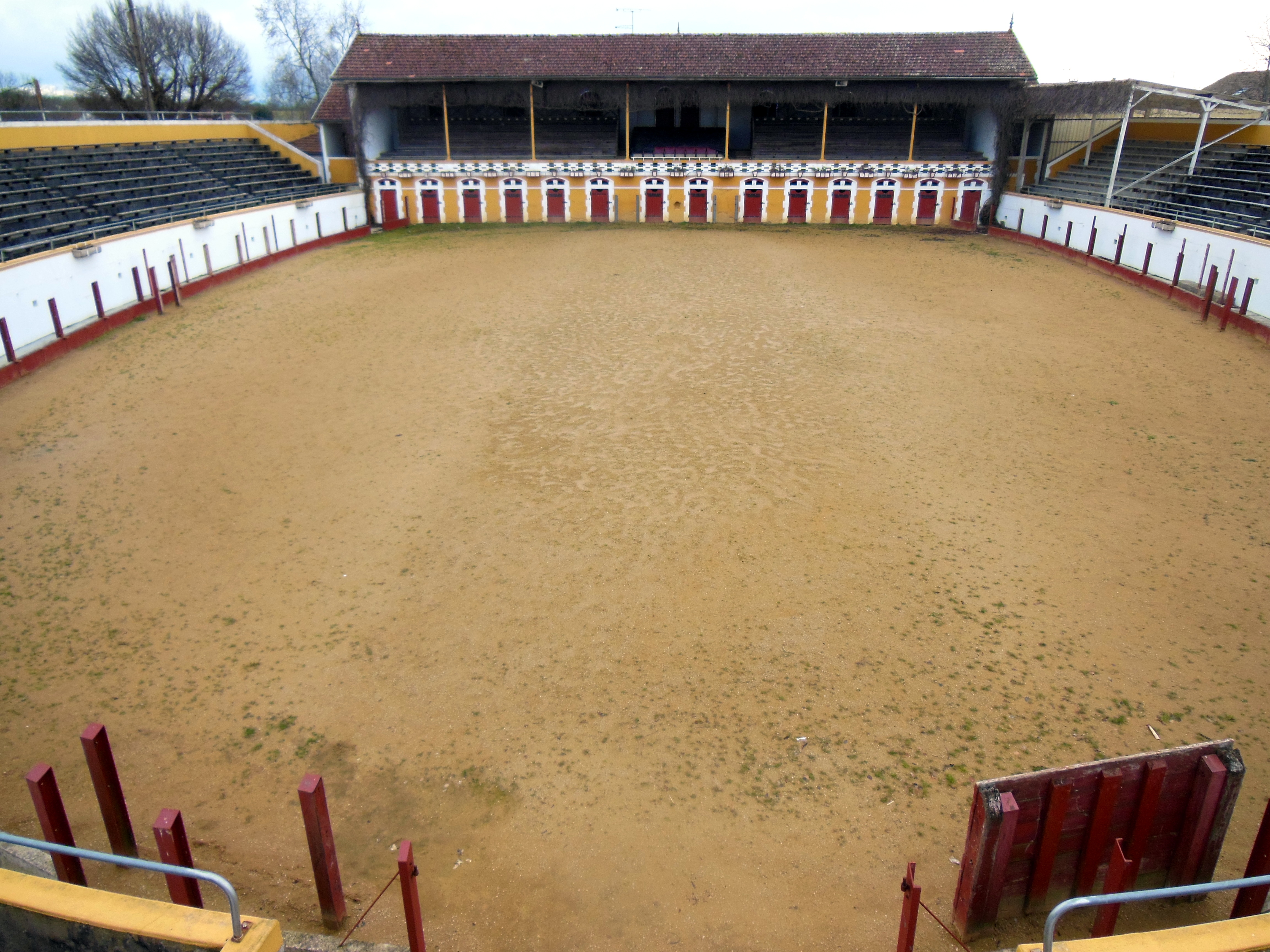 Arènes de Condrette (Mugron, Landes, France), le ruedo (piste)